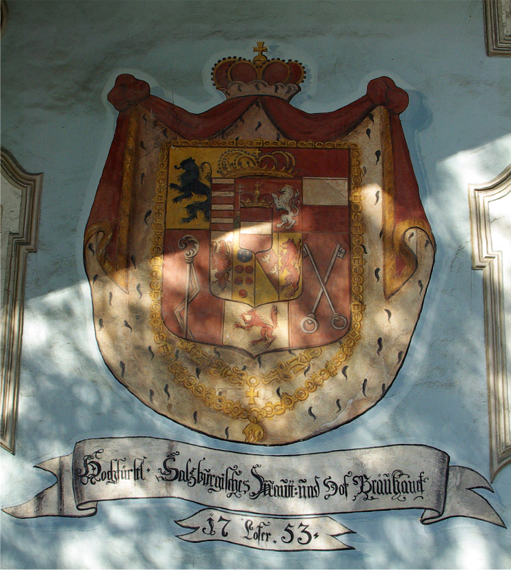 ehem. Verwalterstöckl des Bräuhauses